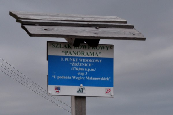 Punkt widokowy Żdżenice